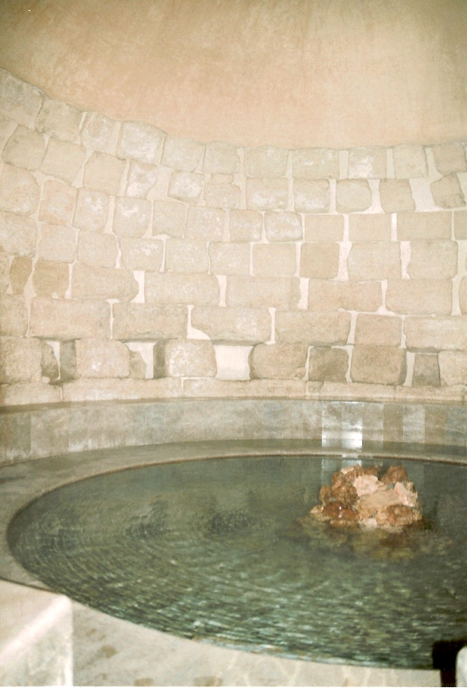 Reste des römischen Bades in Alhama de Granada mit neuzeitlichem Kitsch